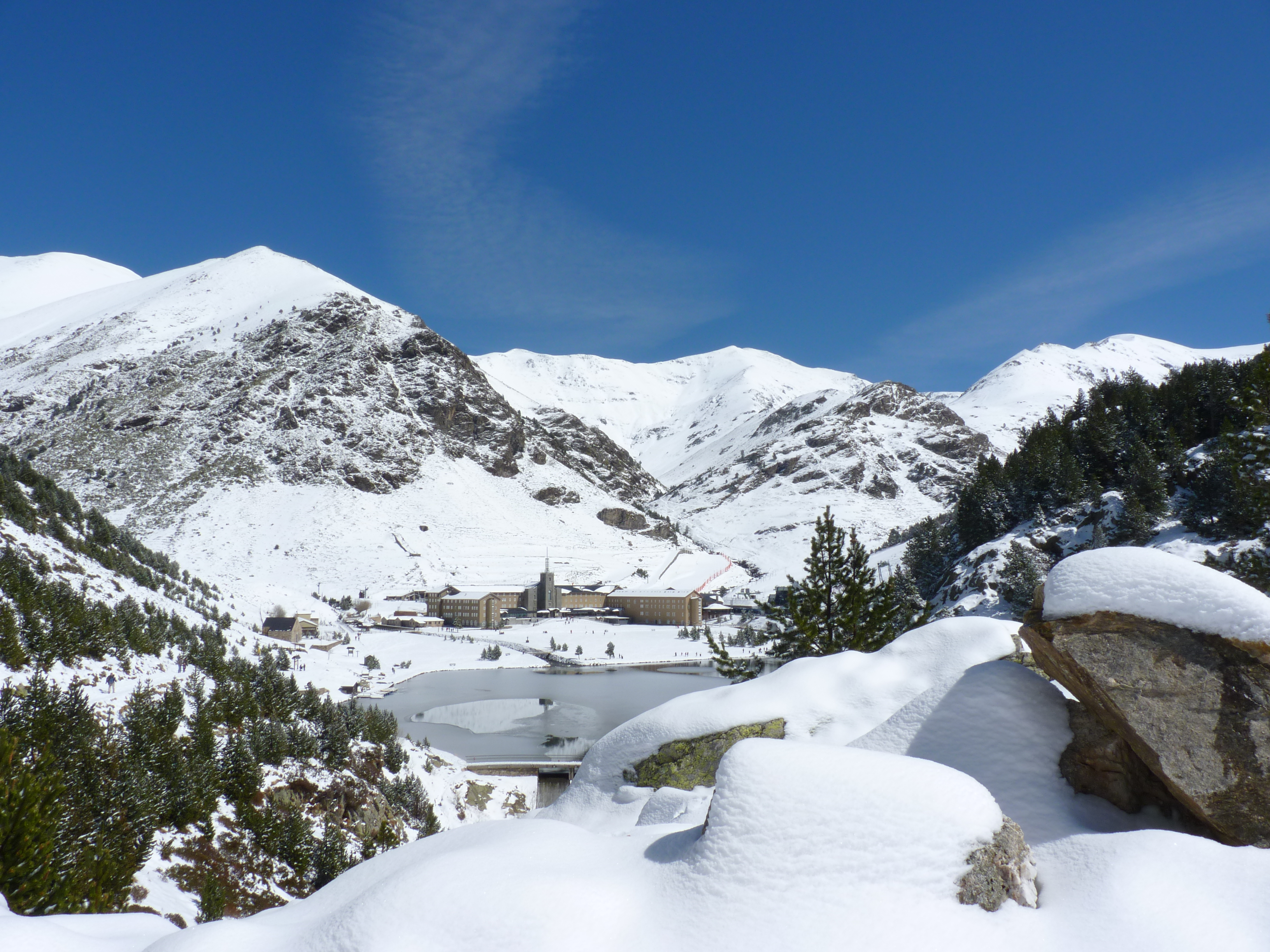 Vall de Núria coberta de neu This is a a photo of a natural area in Catalonia, Spain, with id: ES510095